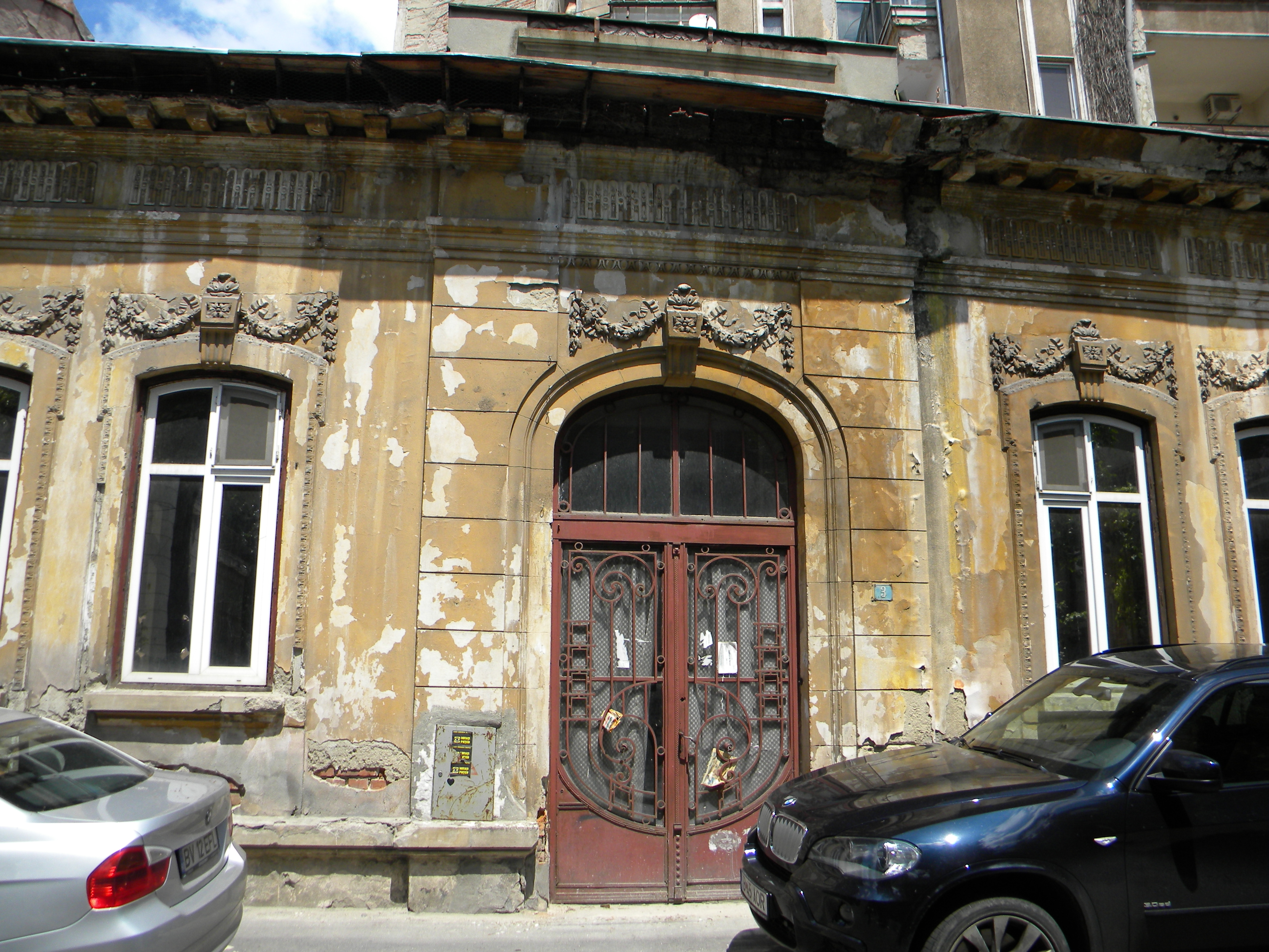 Bucuresti, Romania, Str. Caimatei nr. 3, sect. 2, B-II-m-B-18267